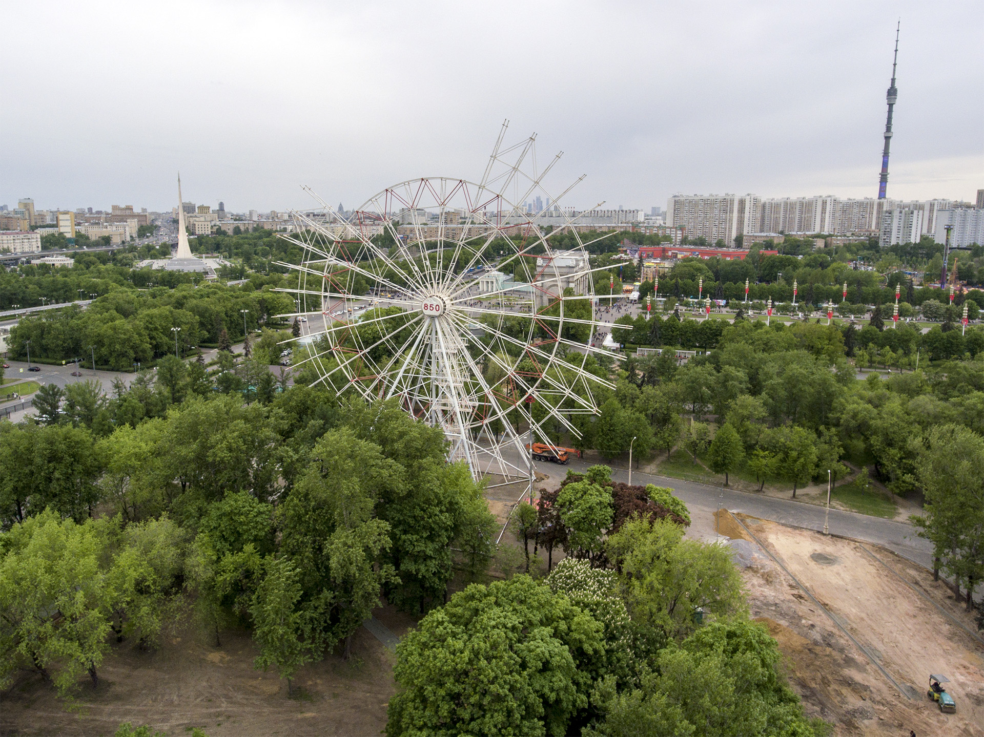 Колесо имени 850-летия Москвы в процессе демонтажа.